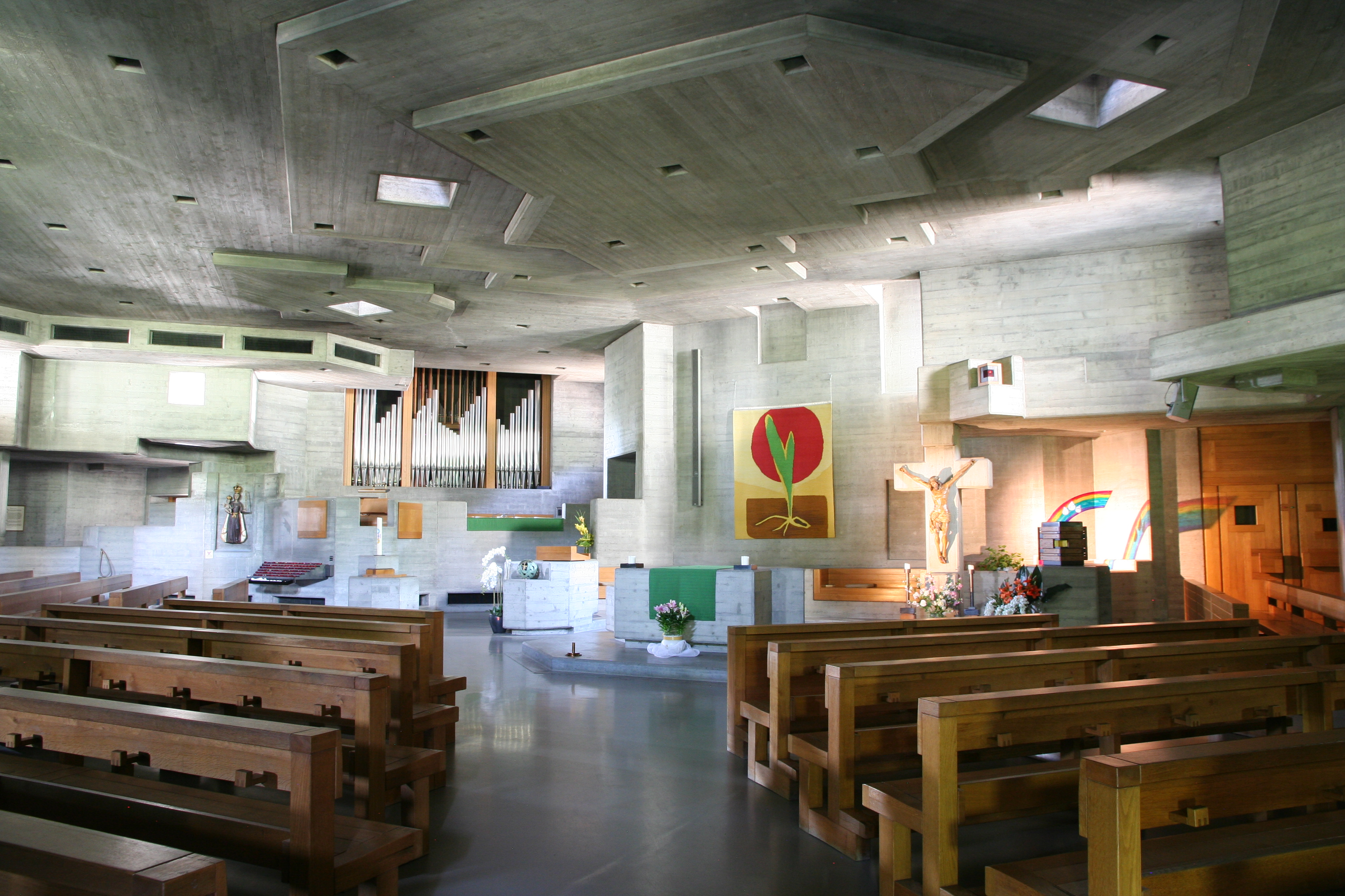 Römisch-katholische Pfarrkirche Heiligkreuz Bern